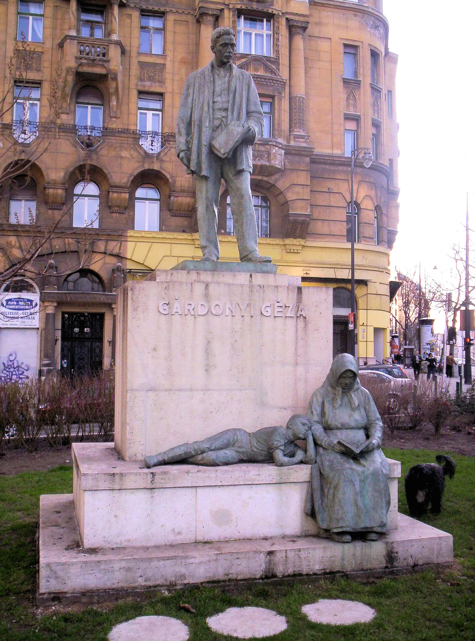 Gárdonyi Géza szobra Budapesten. Horvai János (1873–1944) alkotása (1933) – photo taken by uploader User:Csanády